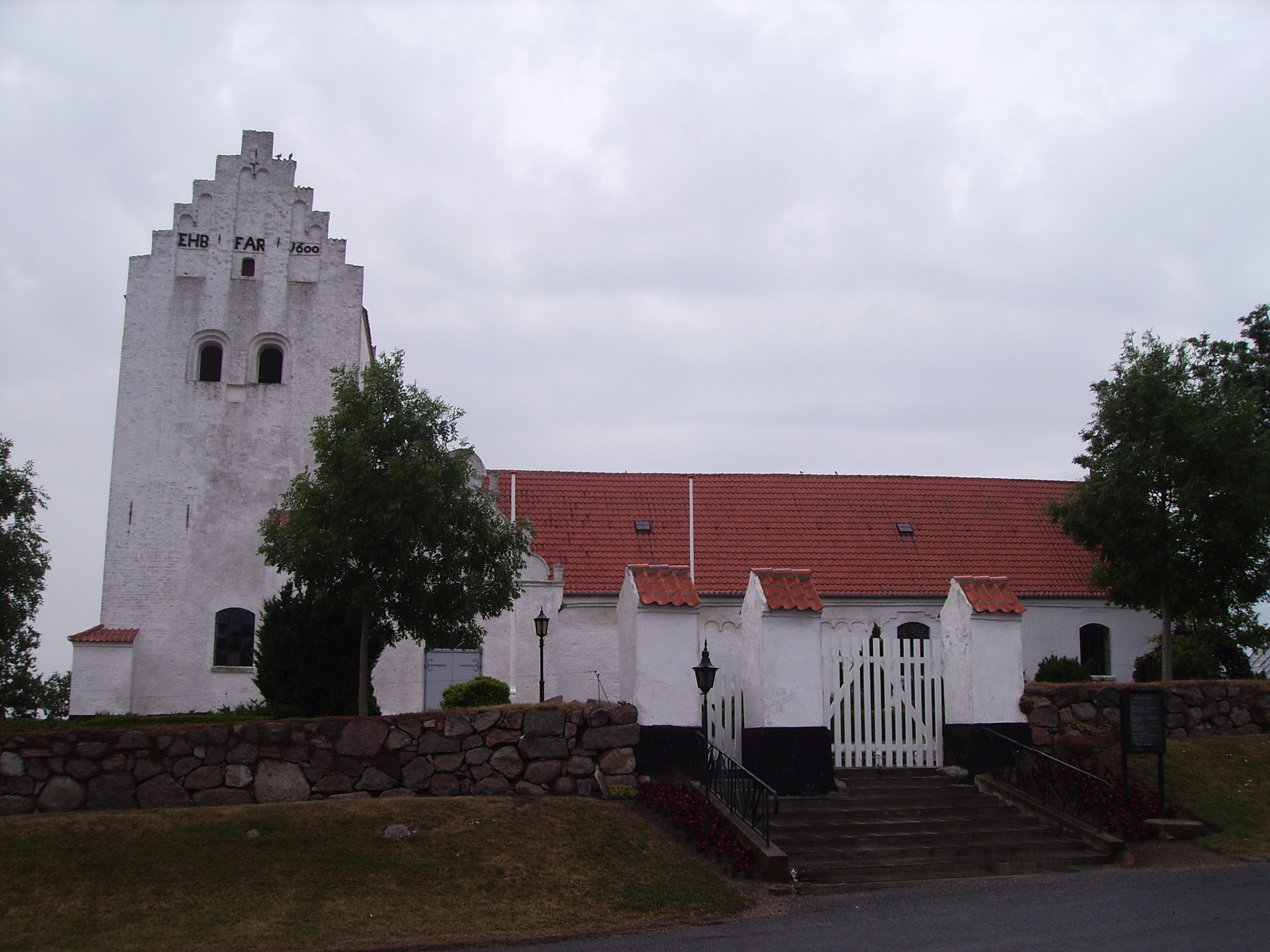 Stubberup Kirke, Stubberup Sogn, Bjerge Herred, Odense Amt, Denmark (Danish Church) - Stubberup Kirke fra syd